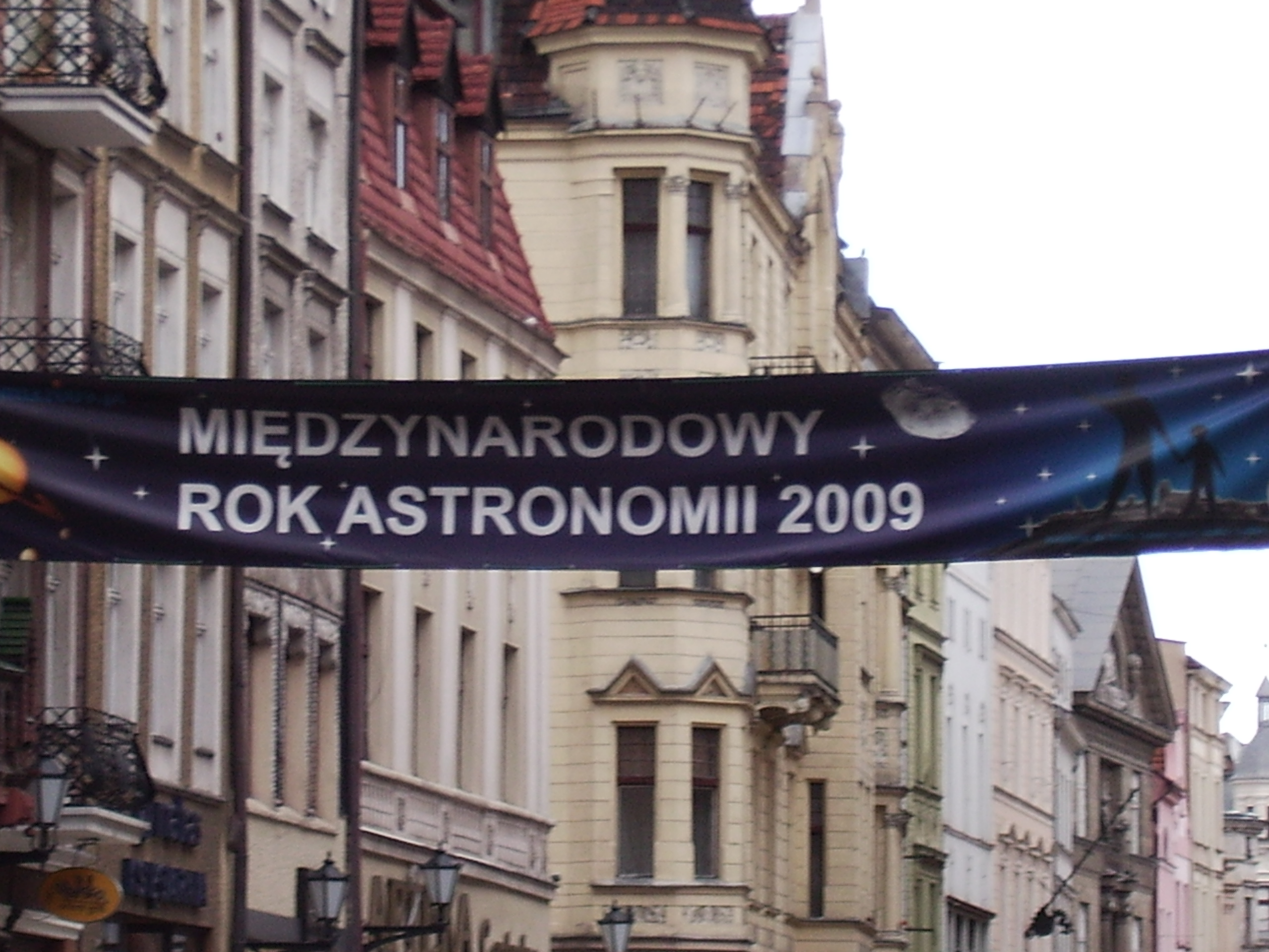 Cartel en Polonia celebrando el Año internacional de Astronomía.